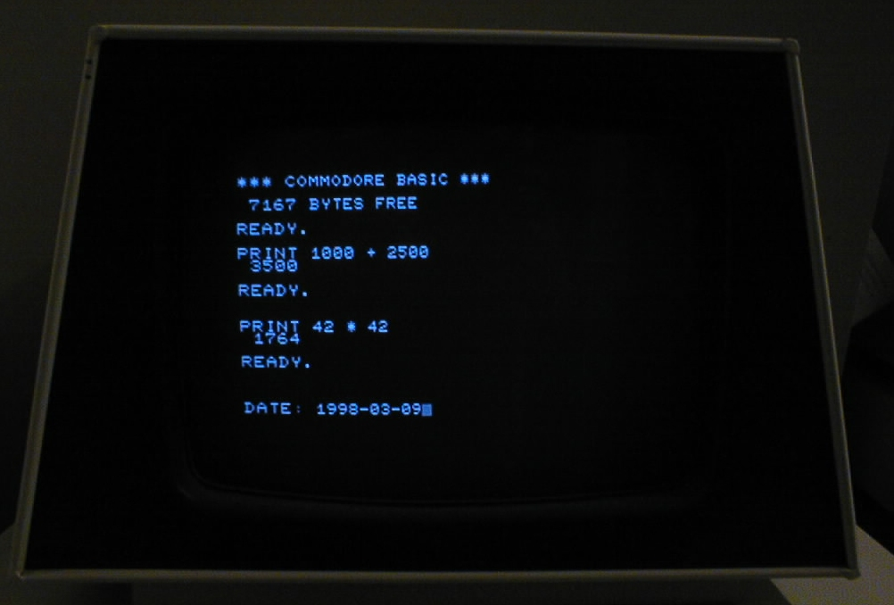 Commodore Pet Screenshot Commodore BASIC, mehrere Eingaben und Ausgaben